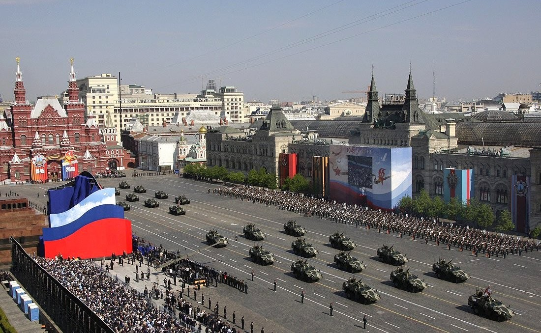 Военный парад, посвящённый 65-летию Победы в Великой Отечественной войне.